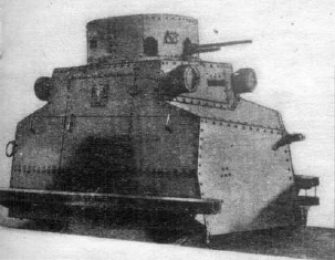 Drezyna pancerna Tatra T 18